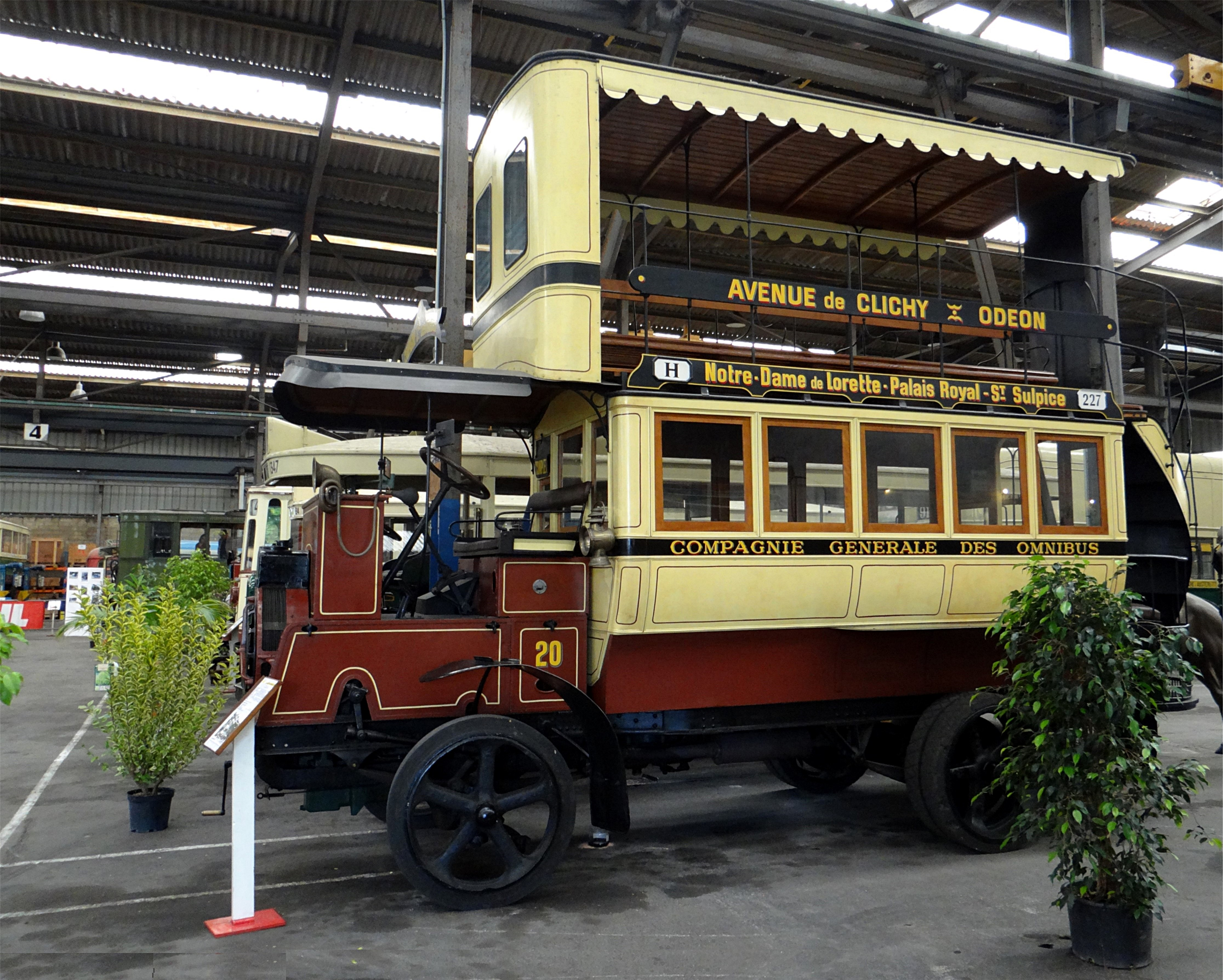 Autobus à impériale Brillié-Schneider P2 N°20 (série de 151 autobus) de la Compagnie générale des omnibus de 1906. Musée des transports urbains, interurbains et ruraux, Chelles, Seine-et-Marne, France.